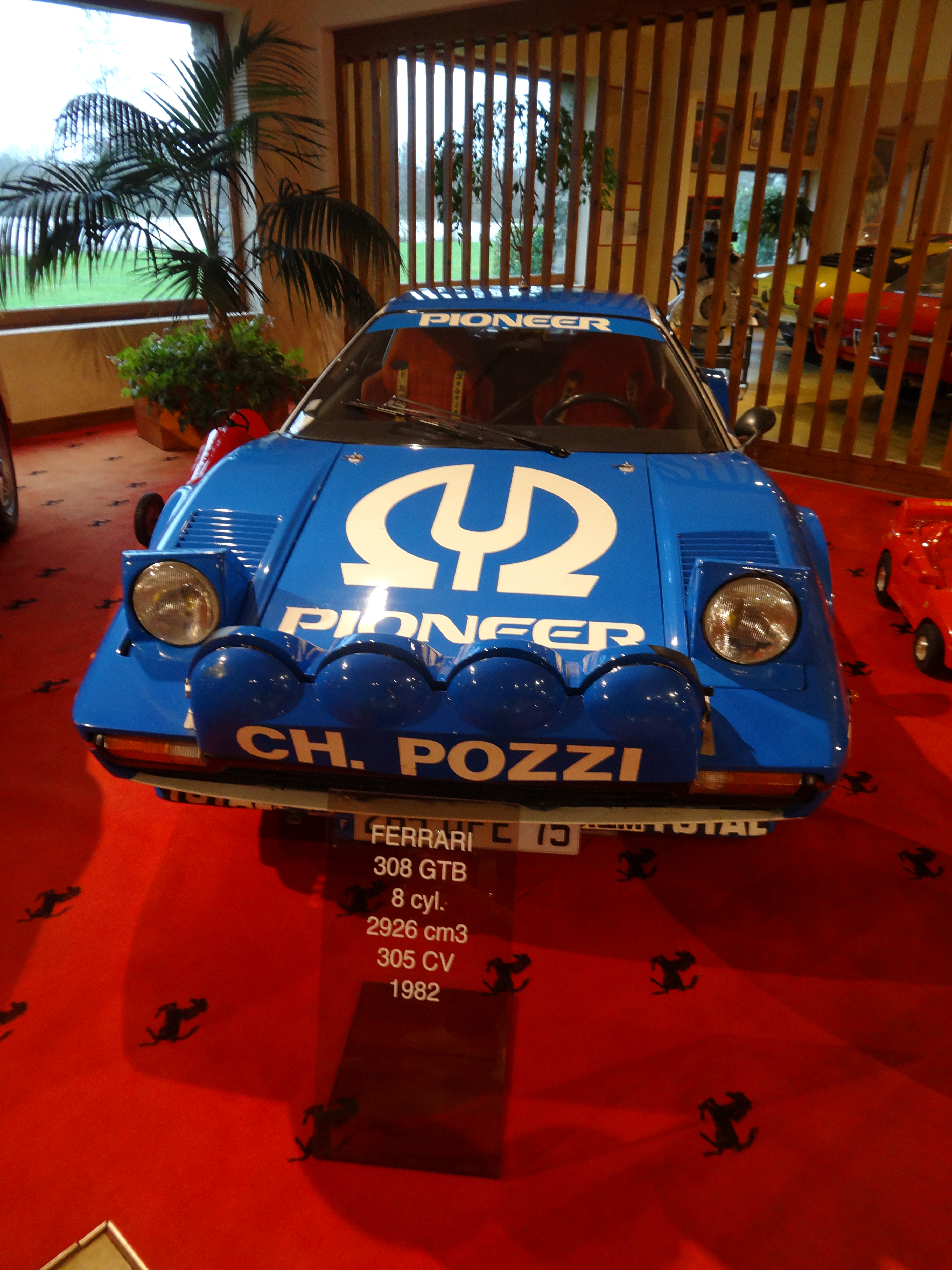 Groupe B Pilote : Jean-Claude Andruet 4 exemplaires 310cv à 8 000tr/min 960kg 270km/h + de 300 000€